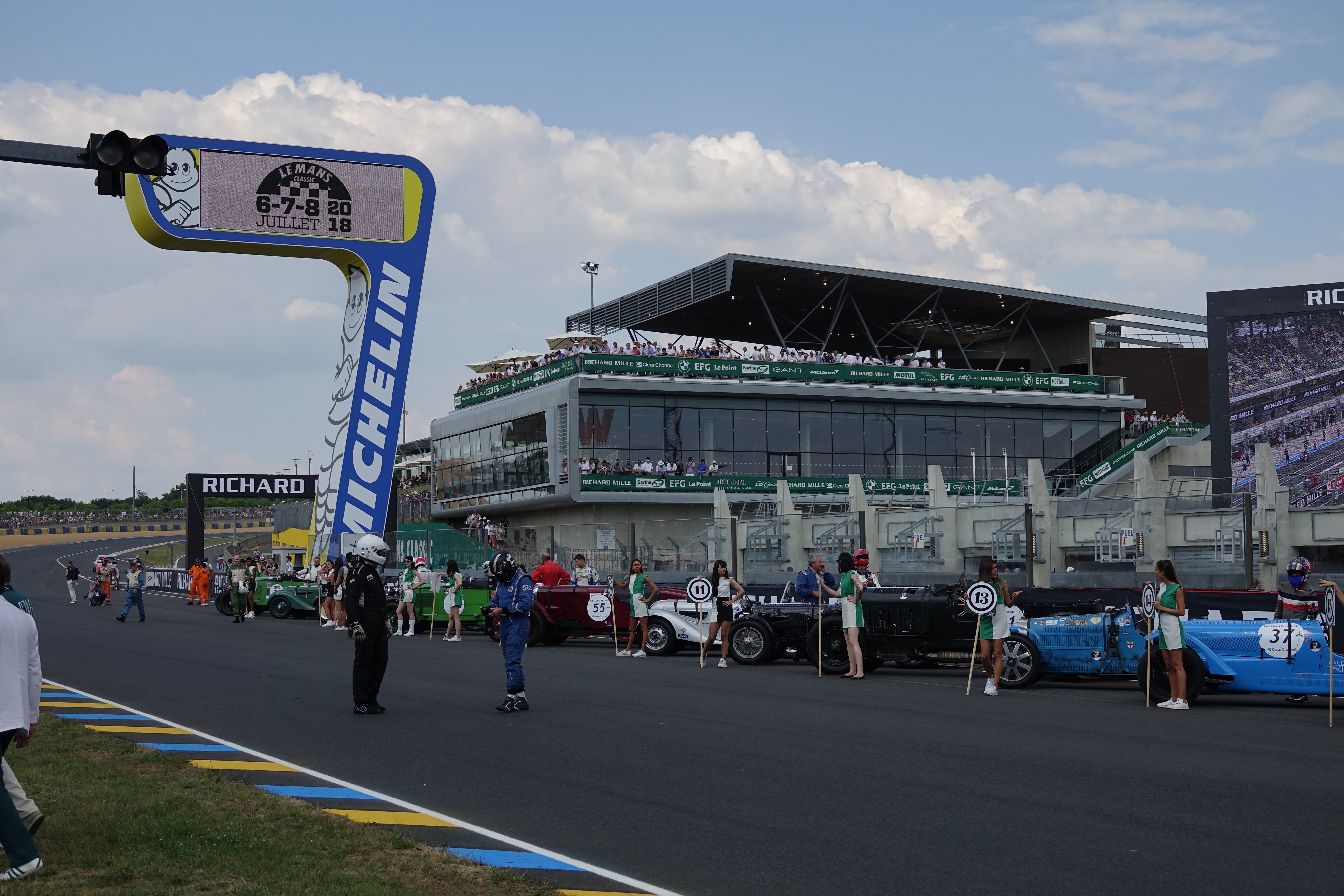 Le Mans Classic 2018